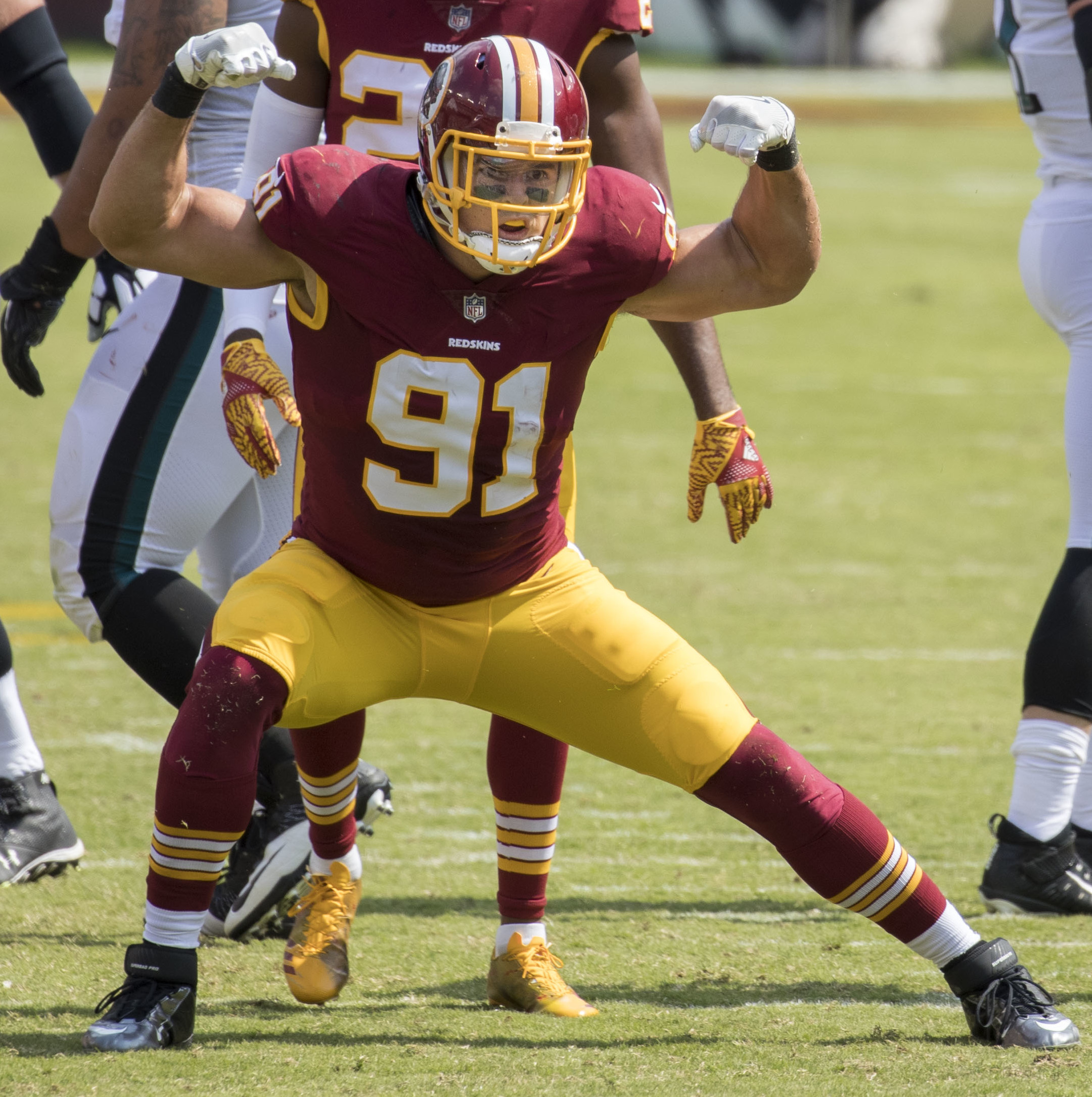 Eagles at Redskins 9/10/17